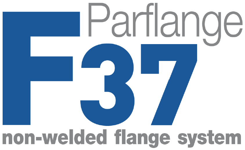 Logo von